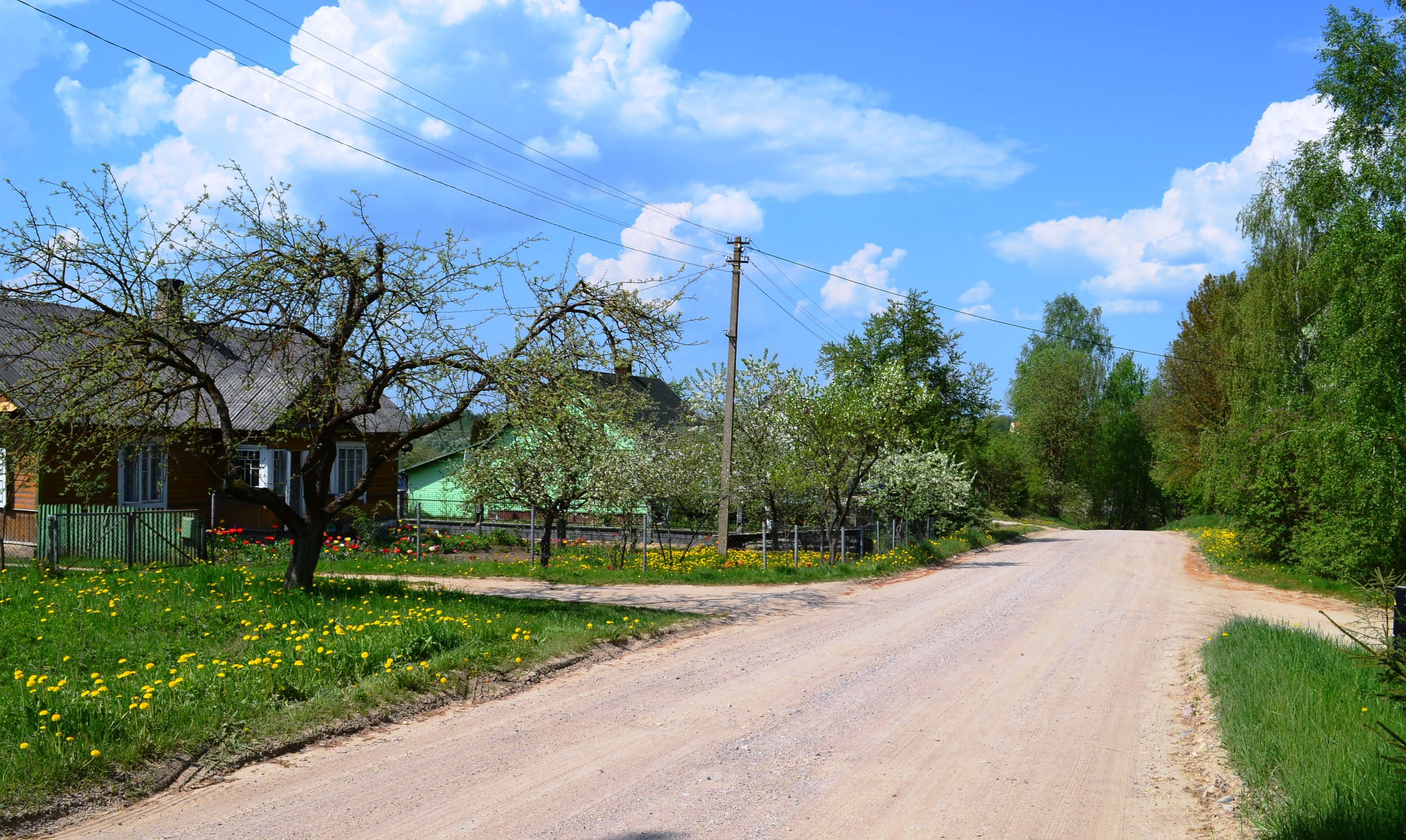 Bendoriai, Vilniaus raj.